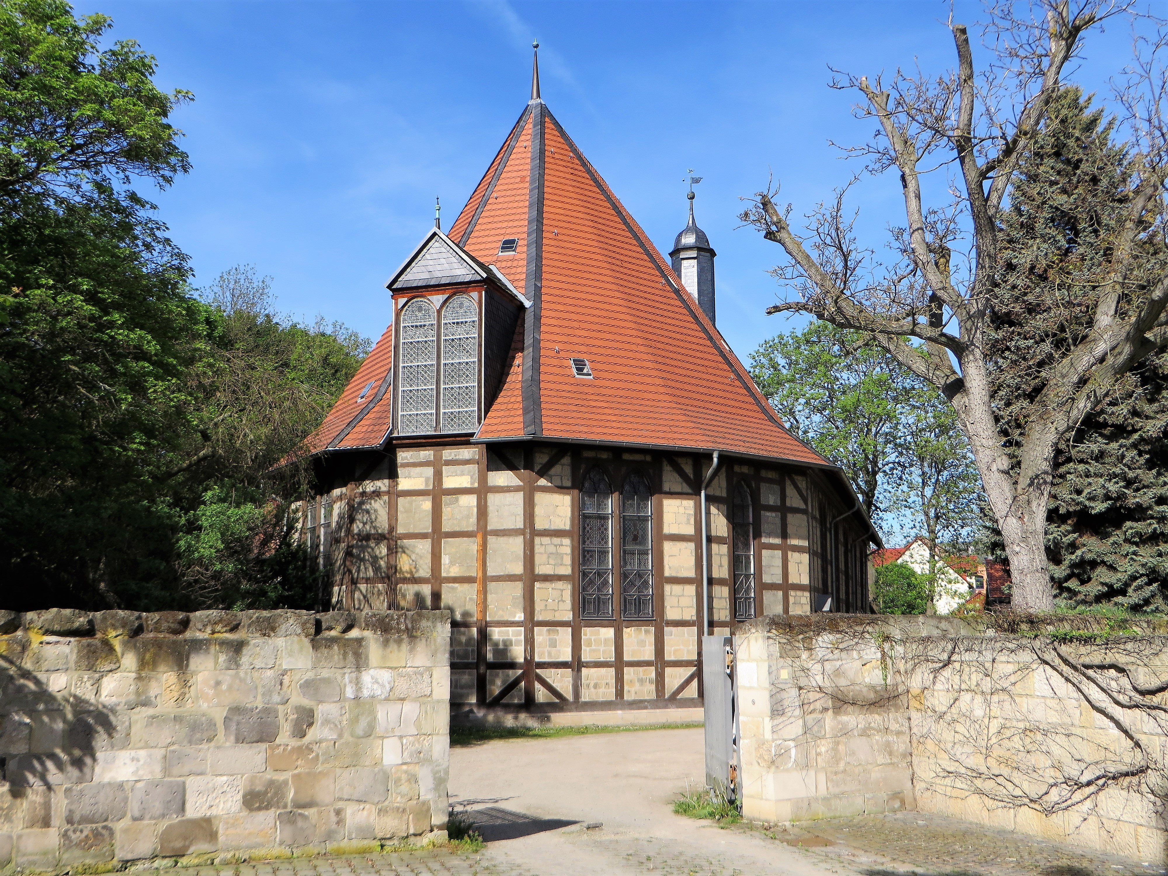 Denkmalgeschützte St. Johannis Kirche in Halberstadt, zwischen Westendorf und Franziskanerstraße. Neben den romanischen und gotischen Kirchen Halberstadts zeichnet sich die Johanniskirche als einzige „echte“ protestantische Kirche durch ihren Fachwerkbau aus. Sie wurde von 1646 bis 1648 mit Hilfe der schwedischen Krone erbaut. Die Kirche zählt zu den größten Fachwerkkirchen Deutschlands. Abseits von der Kirche steht der Glockenturm mit der Johannis-Glocke von 1497.